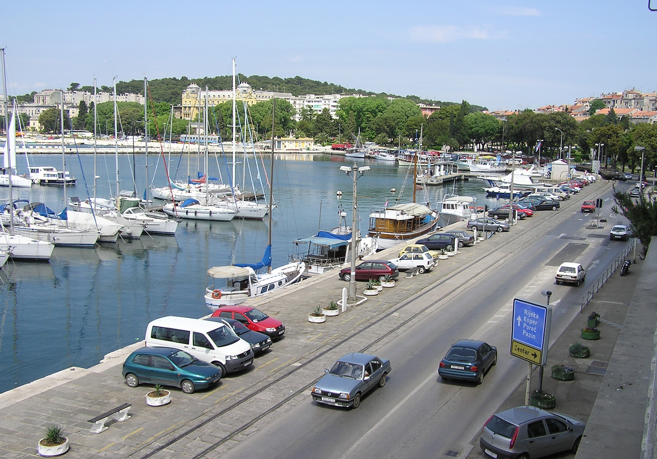 Riva - Pula